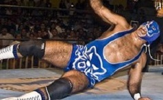 Blue Panther, luchador mexicano.